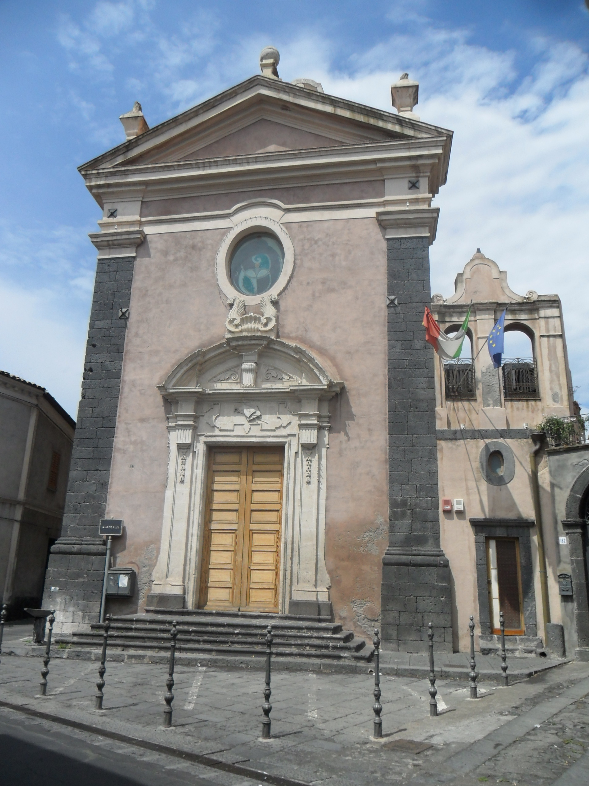 Giulio Pappa, Auditorium Comunale di Mascalucia